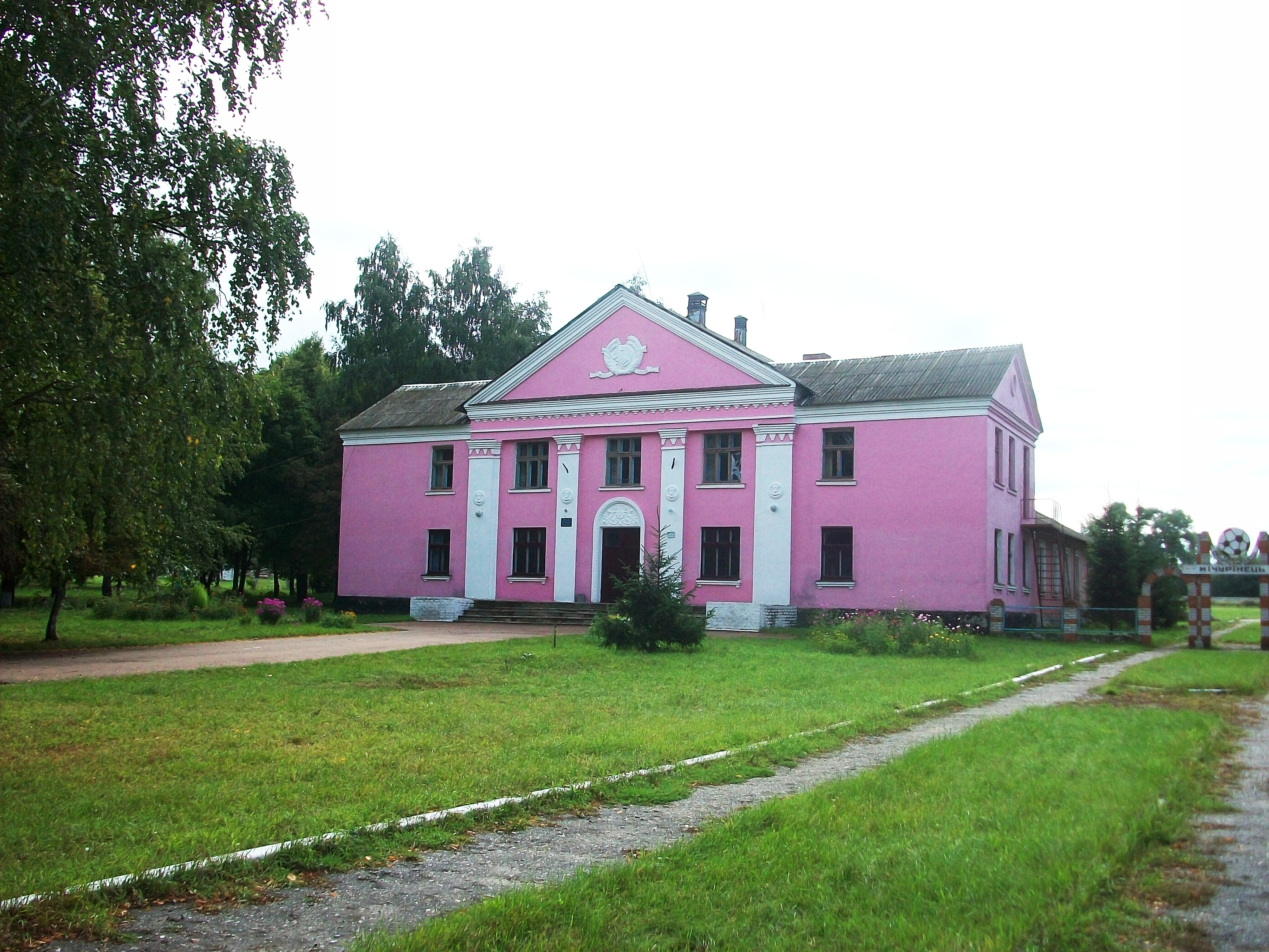 Шевченково (Глуховский район). Дом культуры